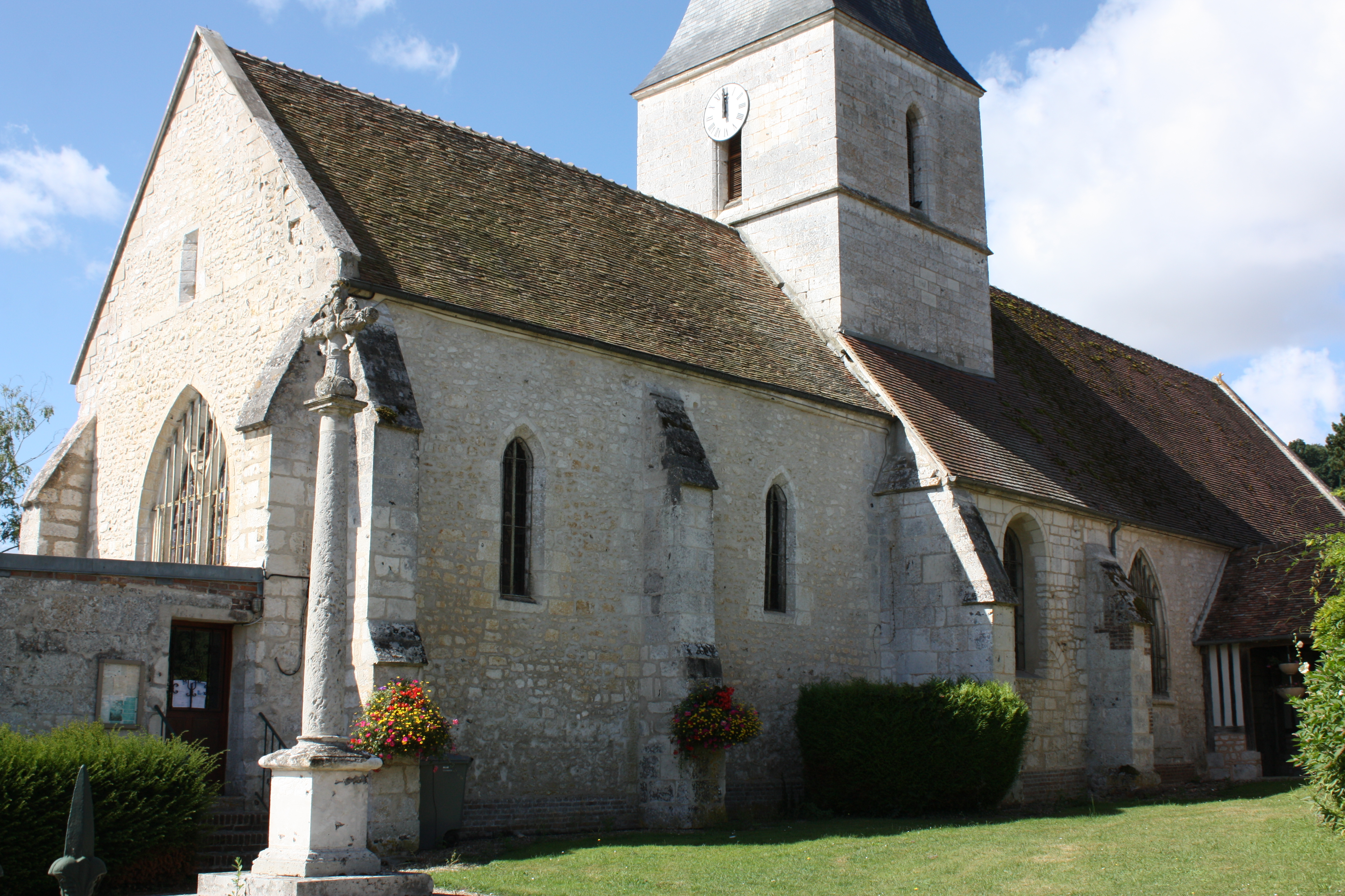 Hondouville - Eglise Saint-Saturnin, l'église vue du Sud-Est.